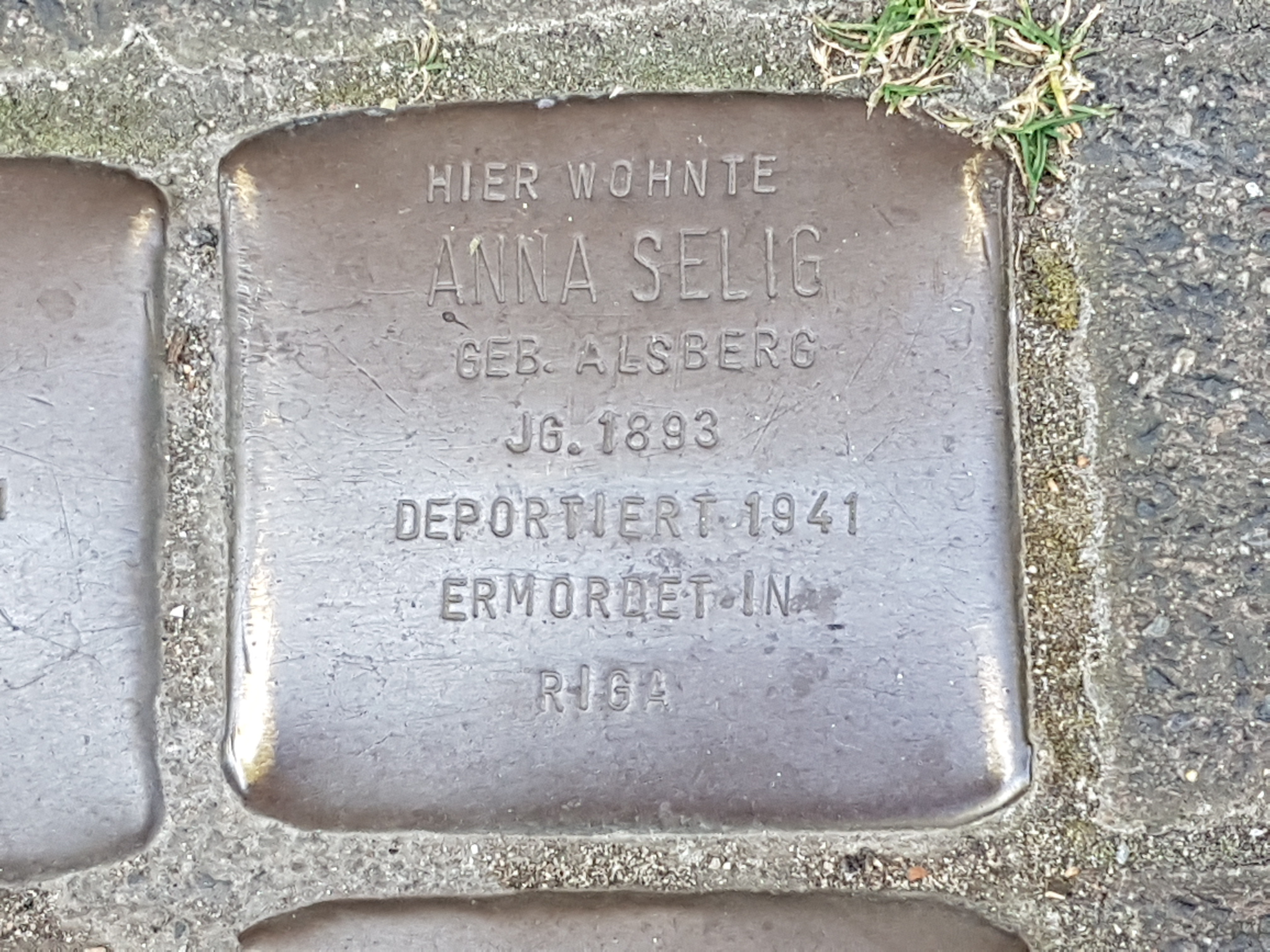 Anna Selig Stolperstein Duisburg